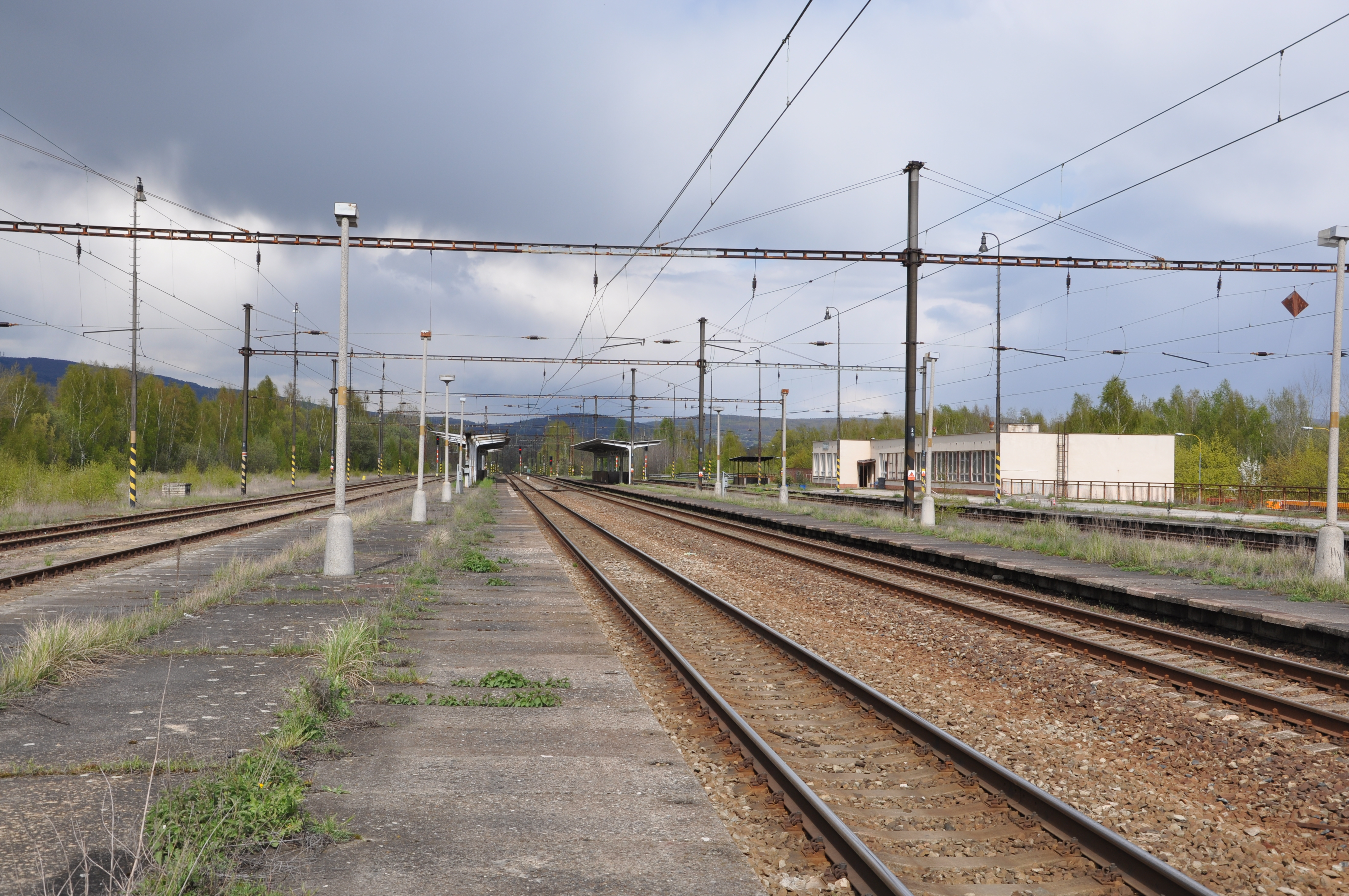 Bahnhof Chabařovice, Tschechien